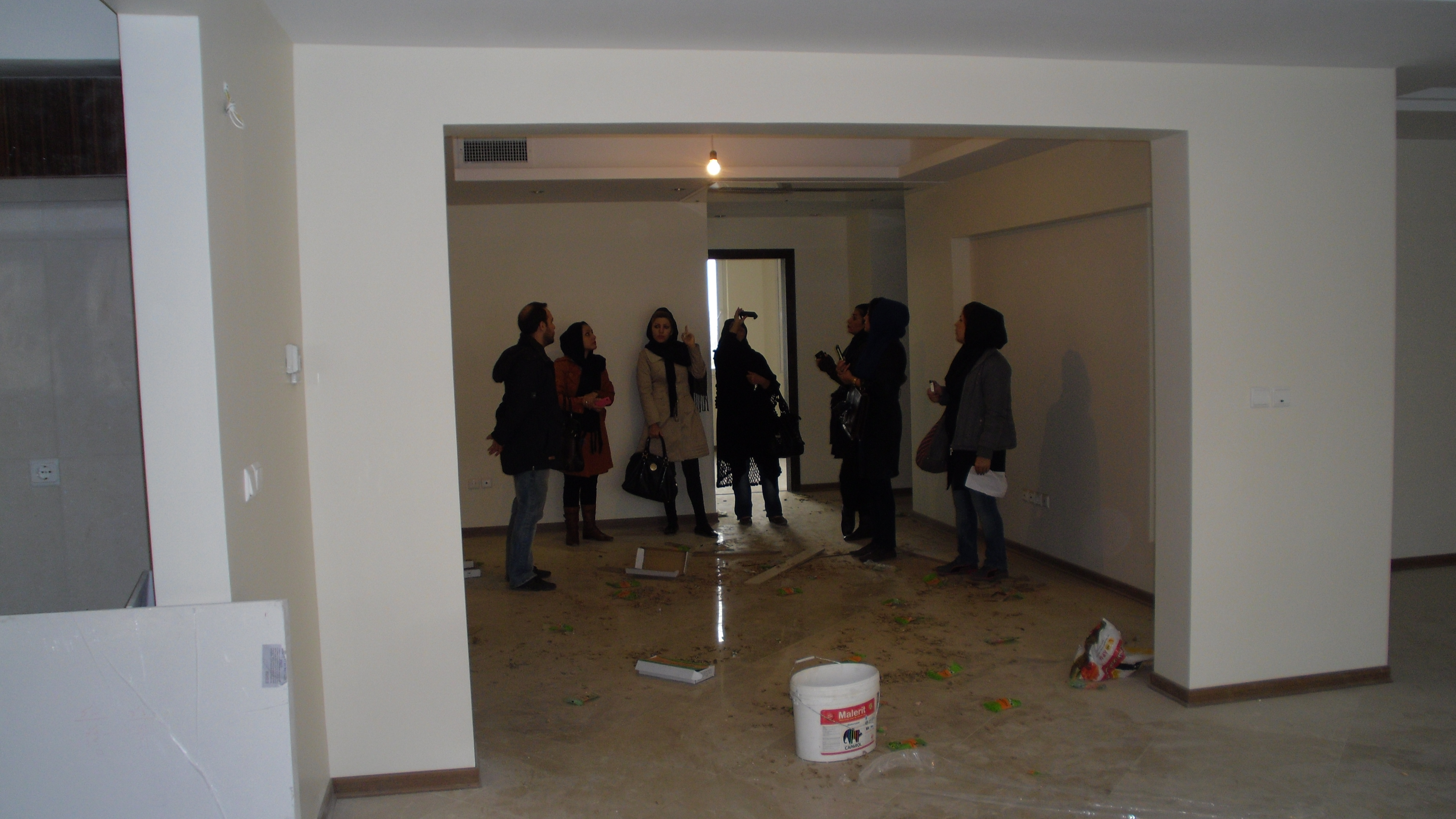 دانشجویان معماری داخلی در حال کاربینی